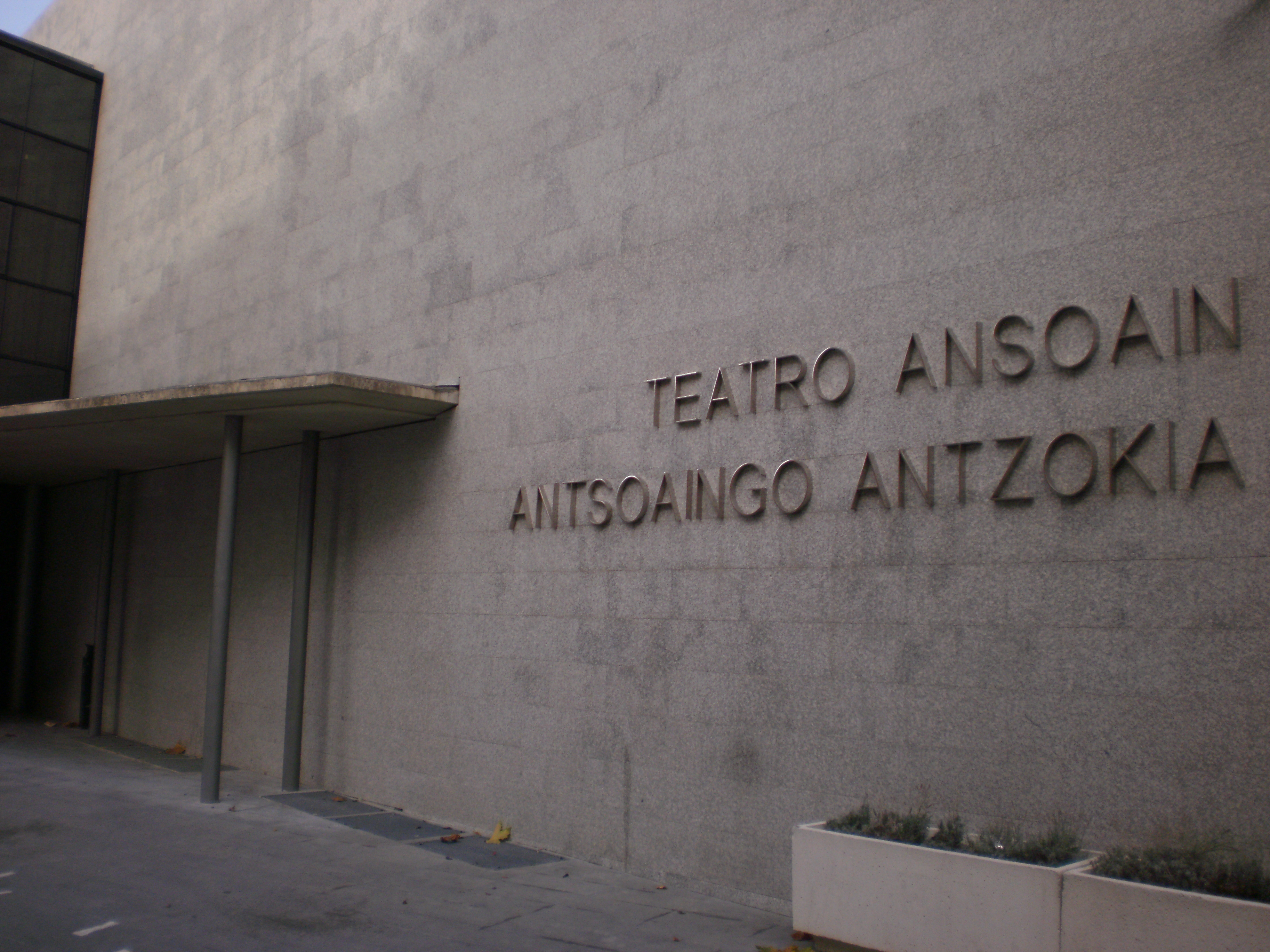 Teatro municiapal de Ansoáin